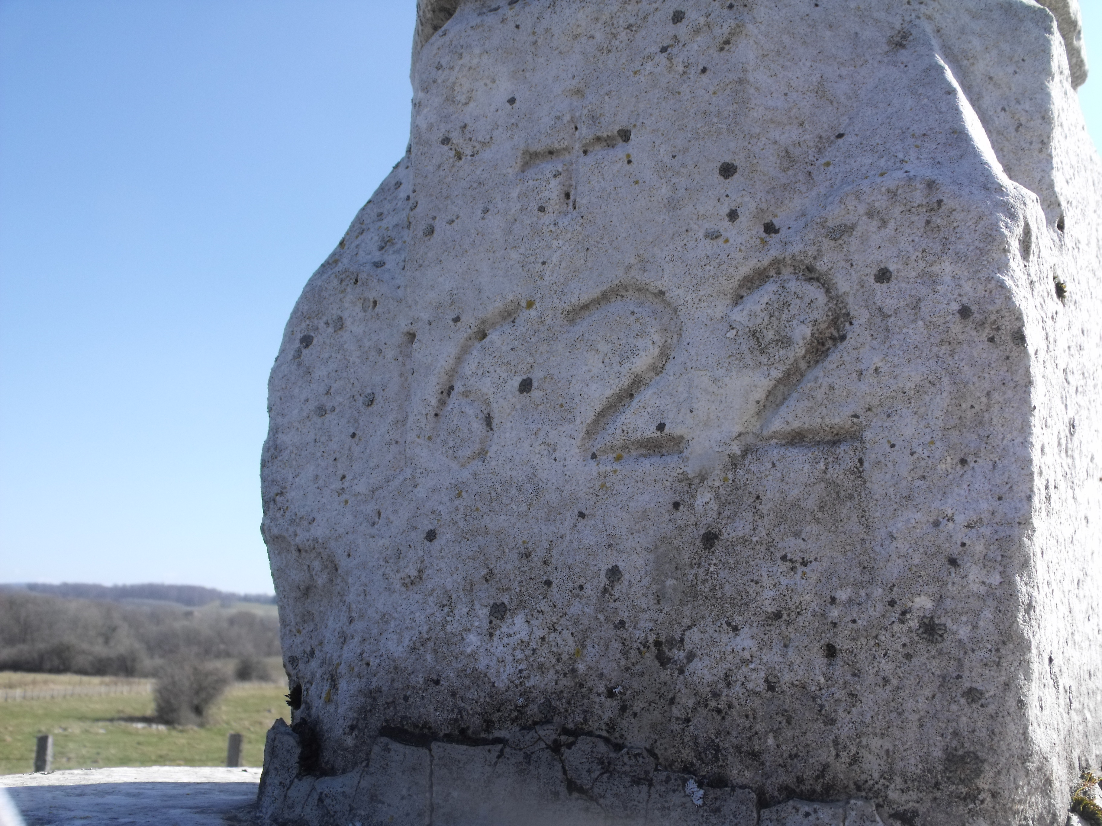 Croix du Mont, Villers la Combe, Doubs, France